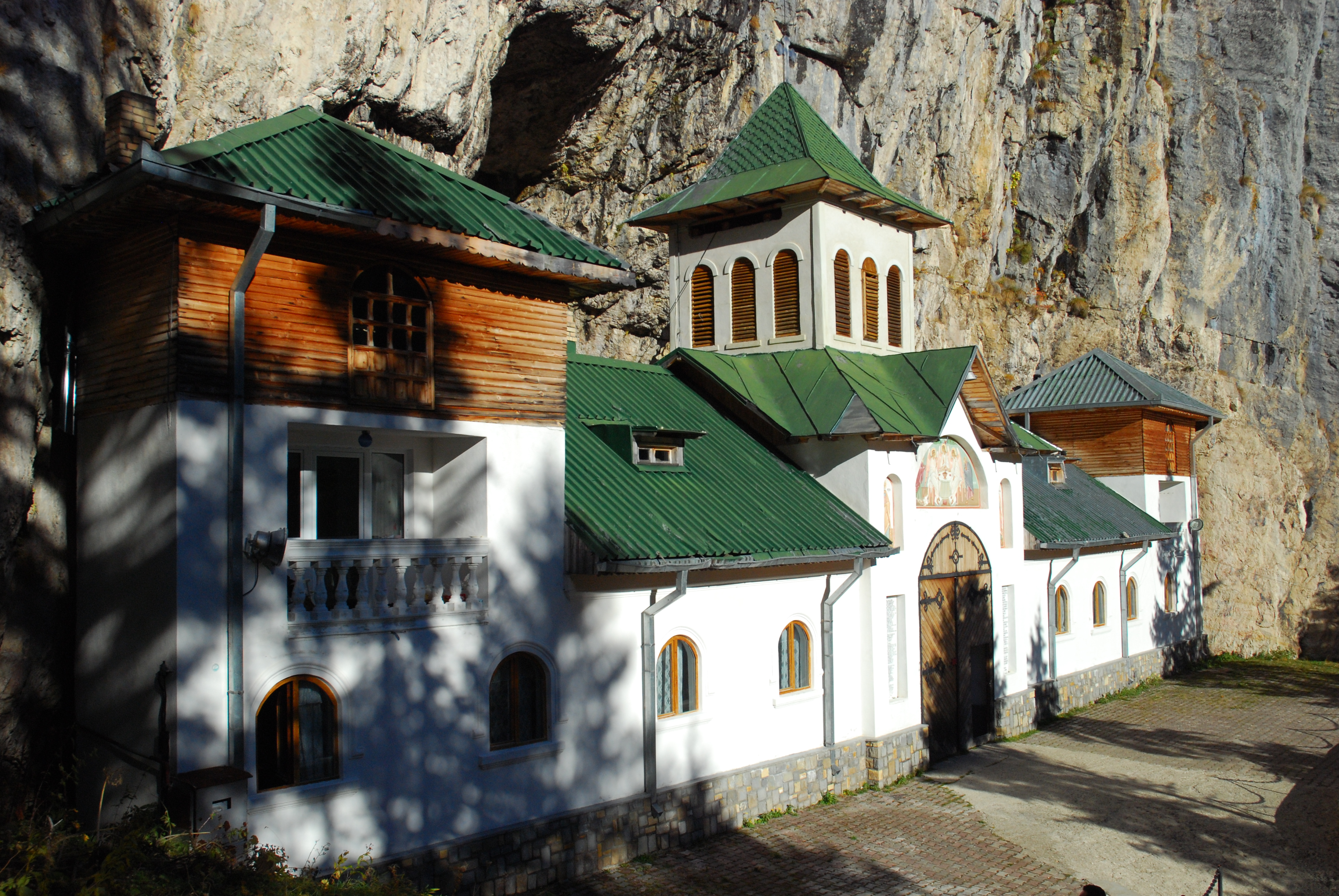 Pestera Monastery